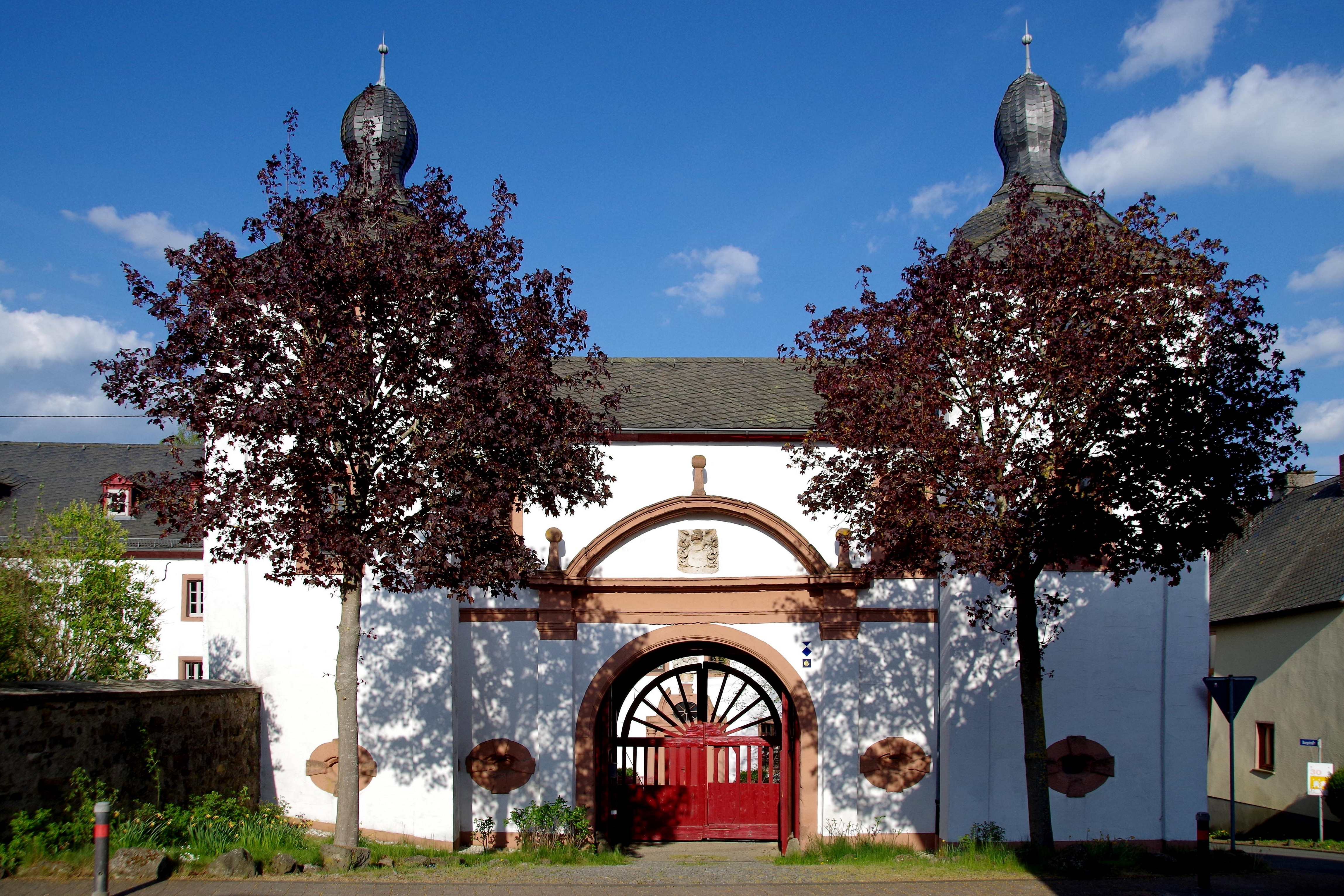 Schloss Oberehe, Torhaus (1692)